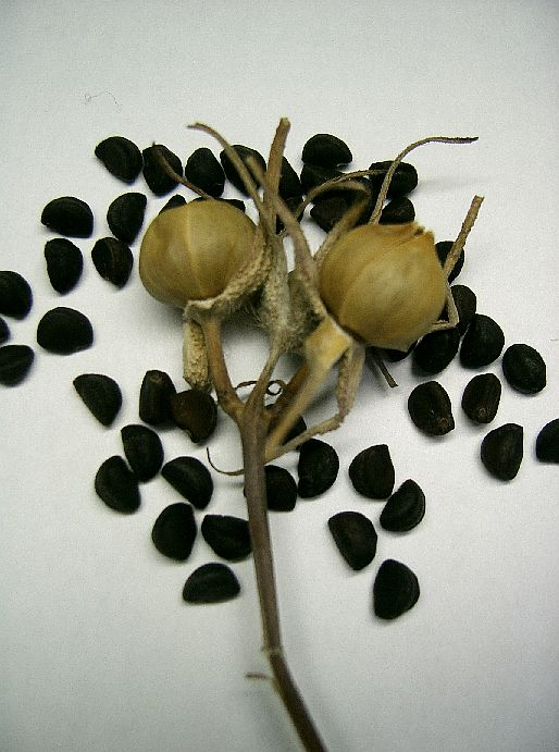 Pharbitis nil